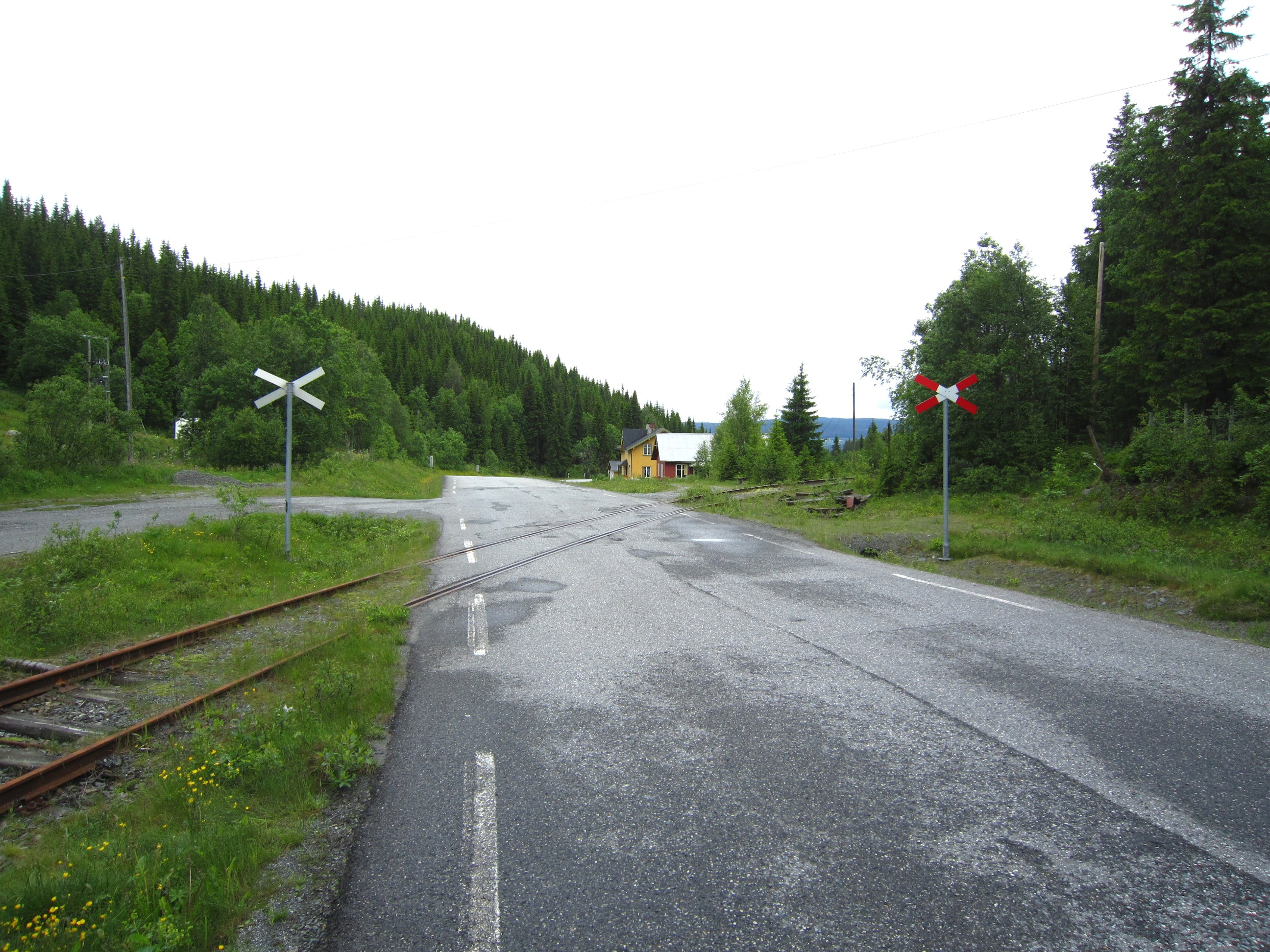 Bagnslinna (fylkesvei 2444, tidl. 219) krysser Valdresbanen nord for Tonsåsen stasjon.